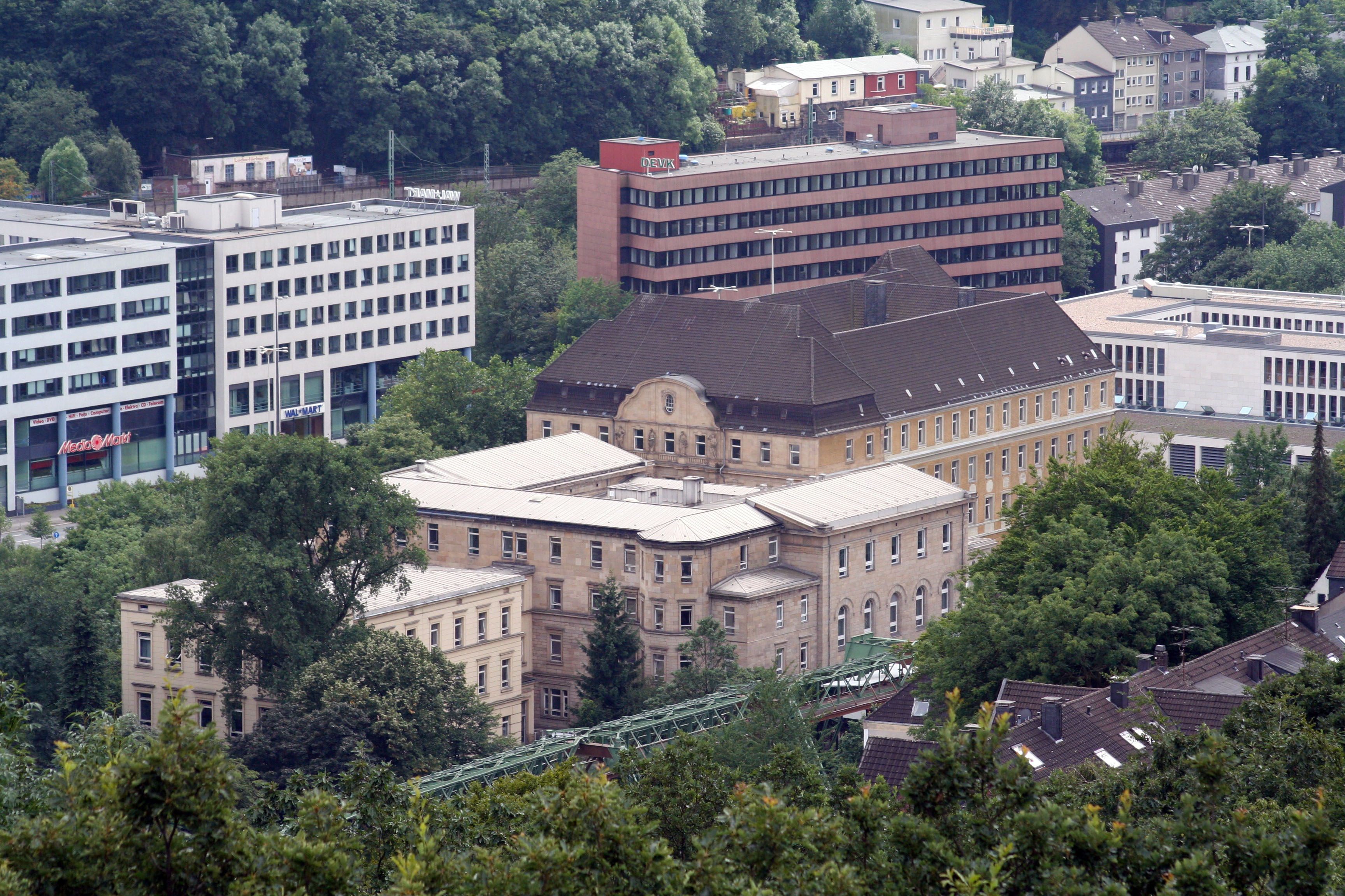 Beschreibung: „Justizzentrum Wuppertal“ mit Land-, Amts- und Arbeitsgericht. Quelle: Selbst erstellt Datum: 26.Juli 2005/ 23.Februar 2007 Autor: Thomas Kathöfer